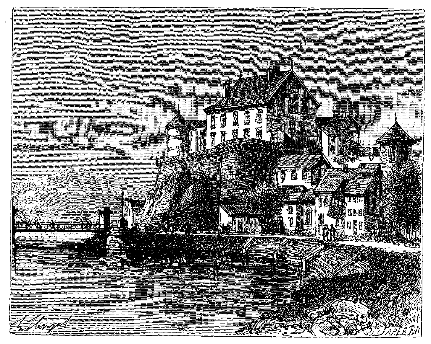 extrait de La France illustrée, géographie, histoire, administration, statistique, etc., tome I, par V.-A. Malte-Brun.